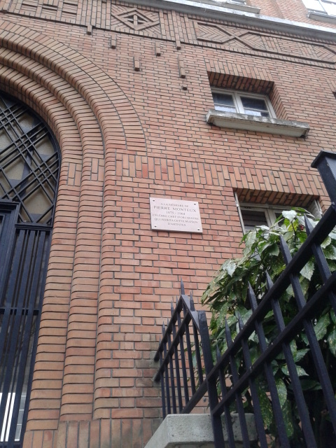 Cité Montmartre-aux-artistes (1929-1936, Adolphe Thiers architecte), 189 rue Ordener, Paris 18e. Plaque à la mémoire du chef d'orchestre Pierre Monteux sur la façade.